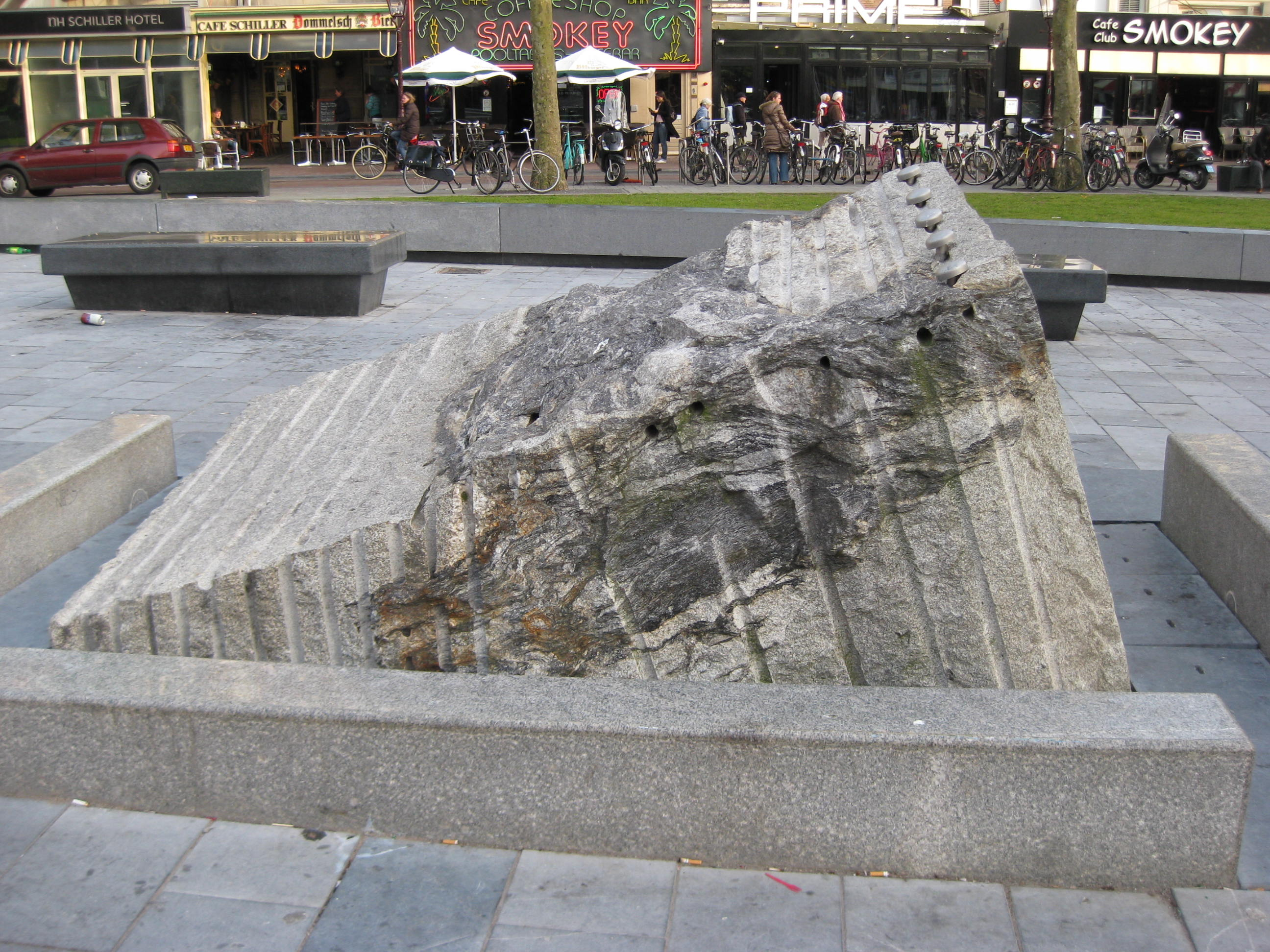 Rotsfontein op het vernieuwde Rembrandtplein in Amsterdam